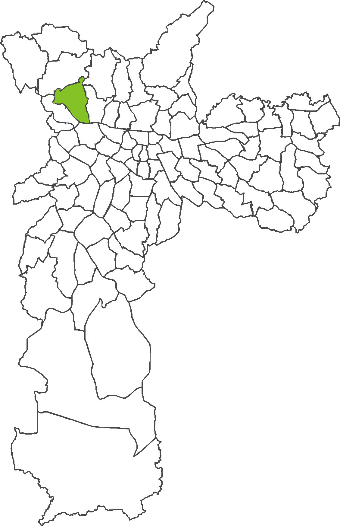 Localização do distrito de Pirituba no município de São Paulo.